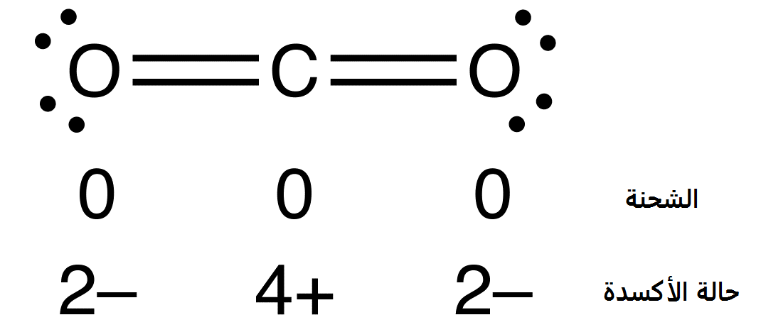 شحنة وحالة أكسدة الذرات في جزيء ثنائي أكسيد الكربون